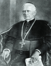 arcibiskup František Xaver Kordač